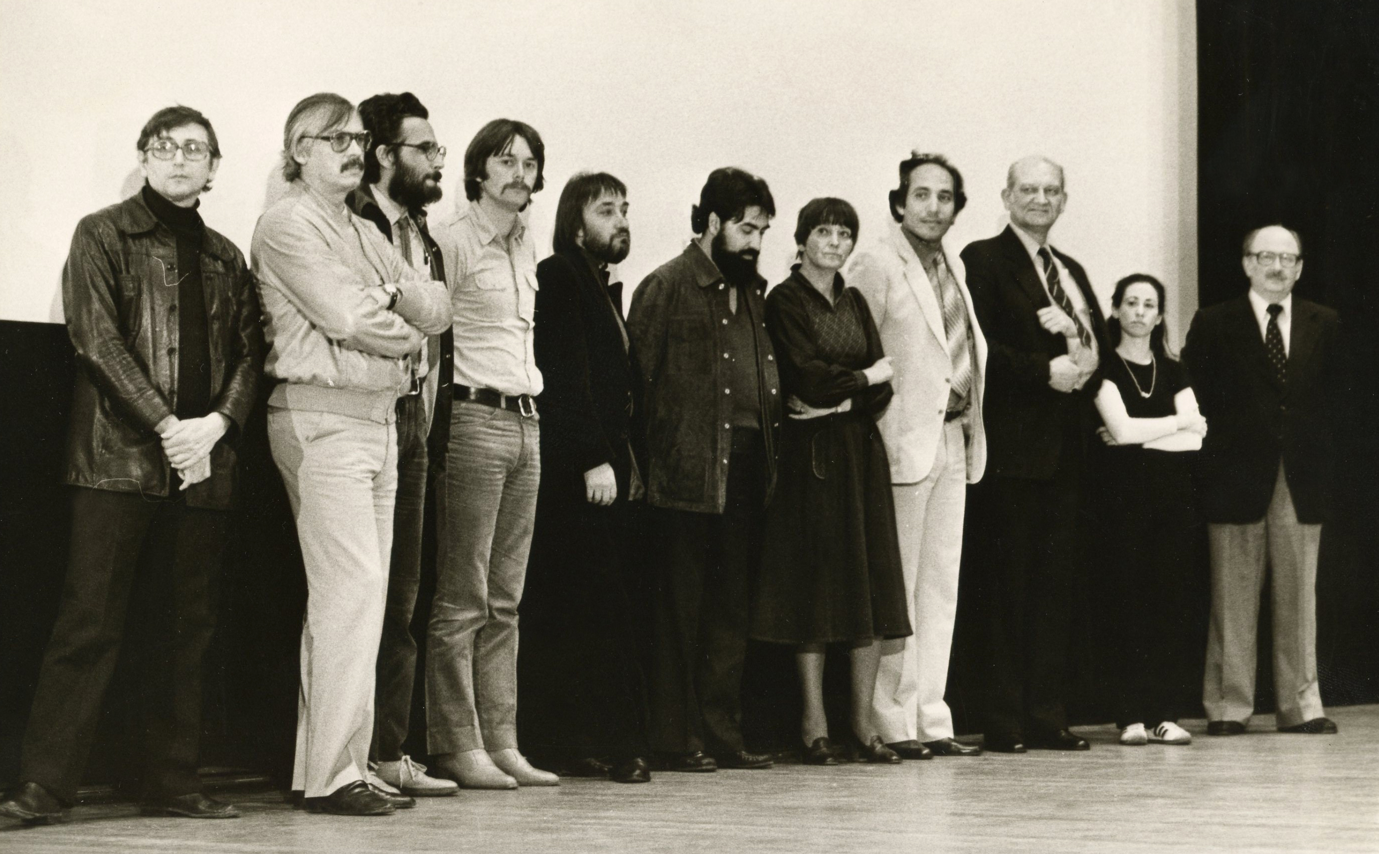 الفاروق (الرابع من اليمين) على المسرح مع بقية أعضاء لجنة التحكيم الدولية في مهرجان أوبرهاوزن للأفلام الوثائقية والقصيرة في ألمانيا في أبريل 1980